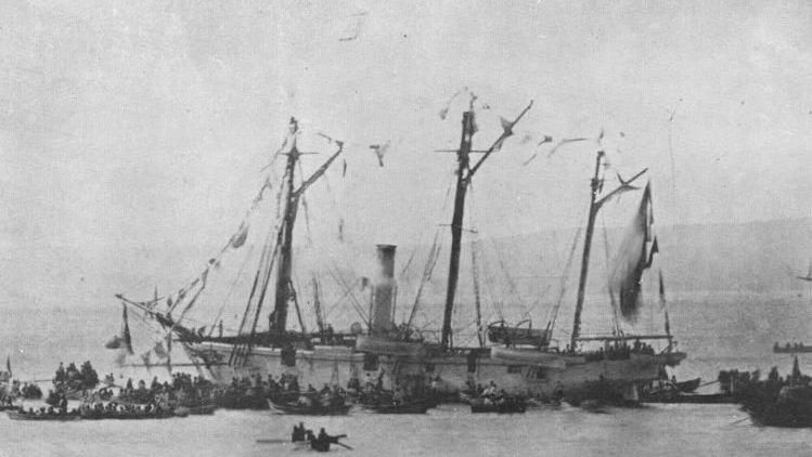 Estado de la Goleta Covadonga después de su combate con La Fragata blindada Independencia